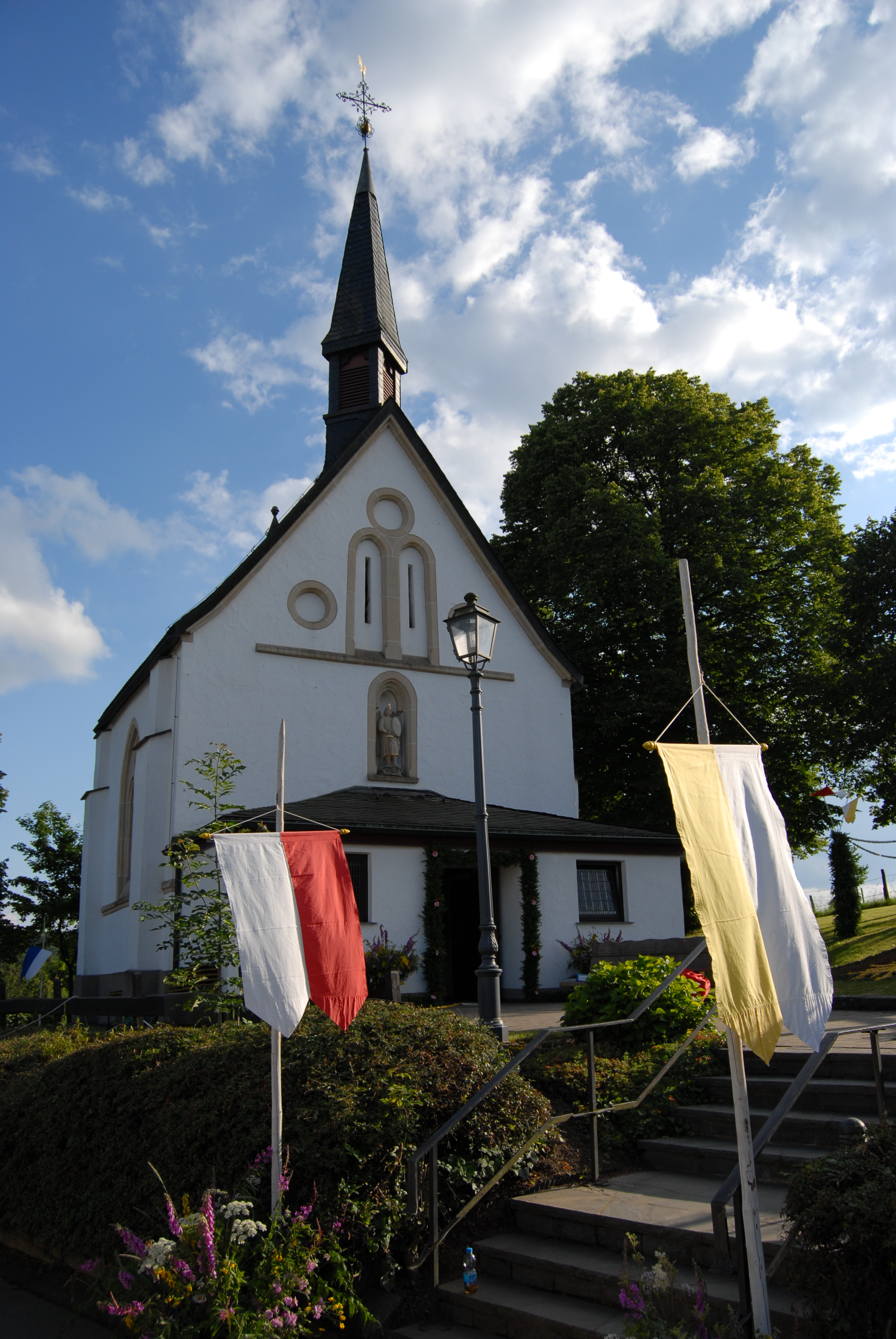 St. Michael zu Sendschotten, Zeitpunkt der Aufnahme: Sendschotter Umgang 2012